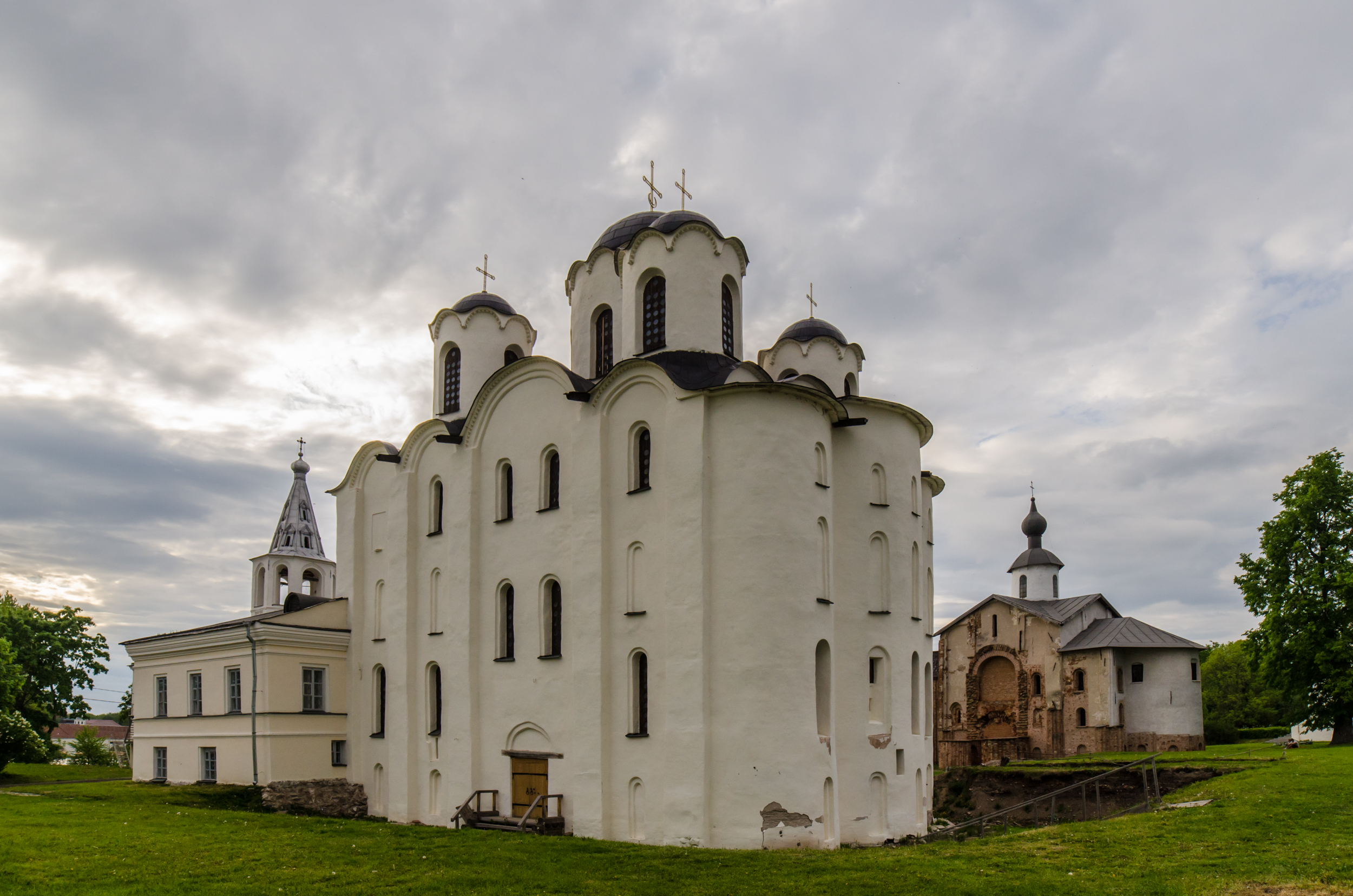 Собор Никольский на Дворище: Ярославово Дворище, Великий Новгород, Новгородская область